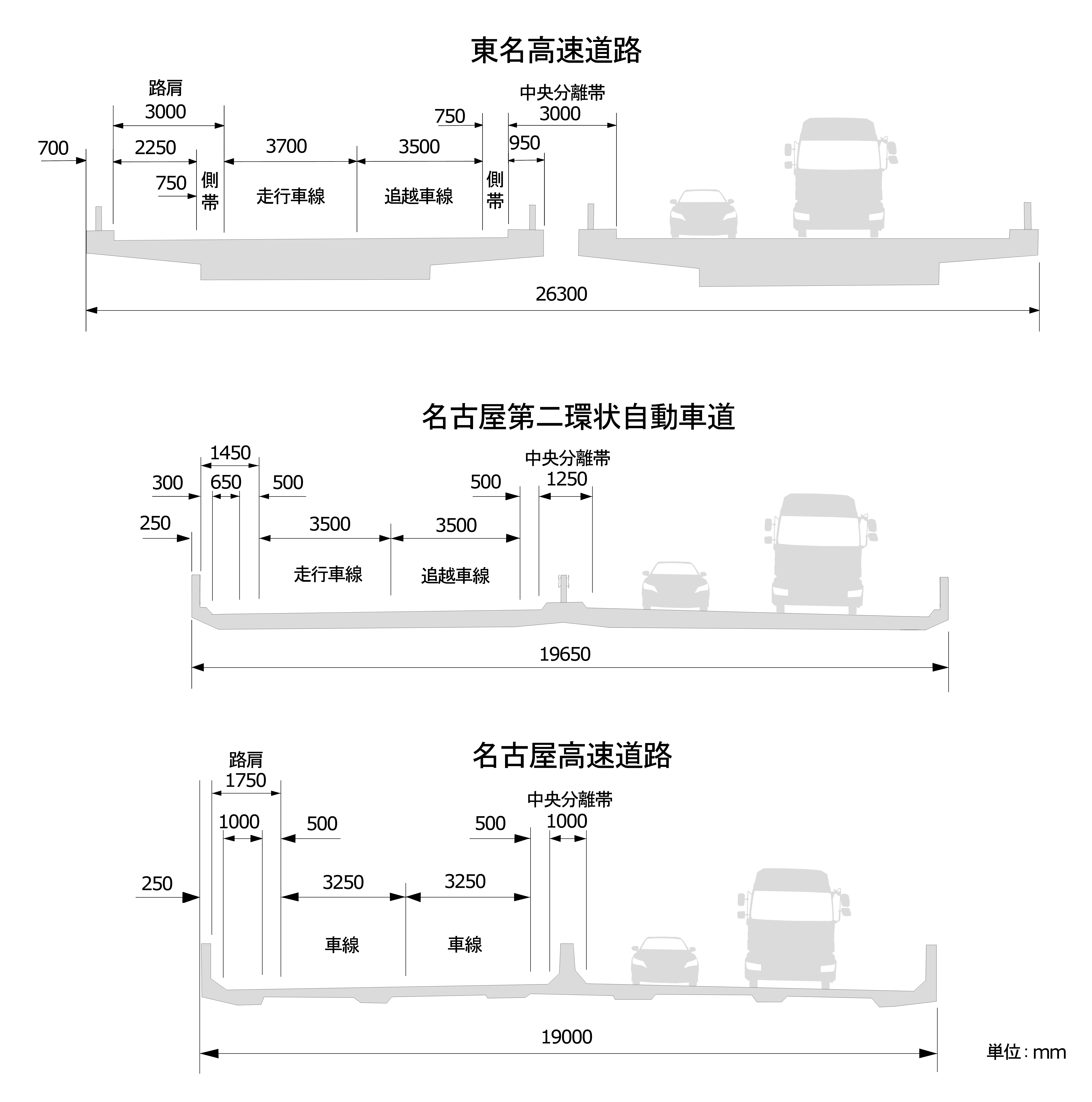 名二環、東名高速、名古屋高速の各横断構成の比較図。典拠：『東名高速道路建設誌』1970年6月1日、日本道路公団、147および230頁・『東名高速道路 中公新書188』1973年2月28日7版、池上雅夫、31-34頁・『近畿（東名阪）自動車道 清洲東・名古屋西間工事誌』1992年10月、日本道路公団、40および43頁・『名古屋高速大高線円上・大高間工事誌』1980年11月、名古屋高速道路公社、53-54頁